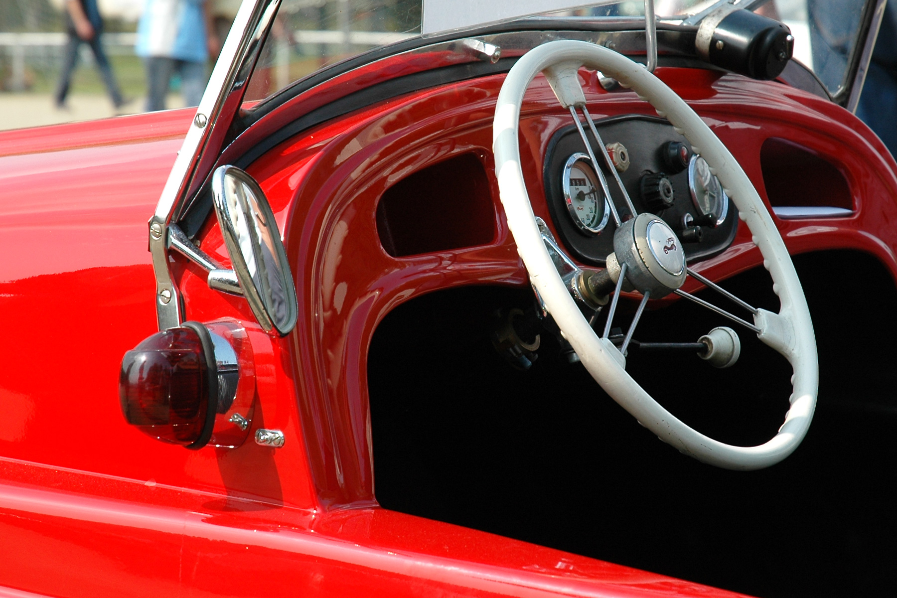 Kleinschnittger F125, Baujahr 1952, Armaturenbrett, Lenkrad, Blinker, Rückspiegel